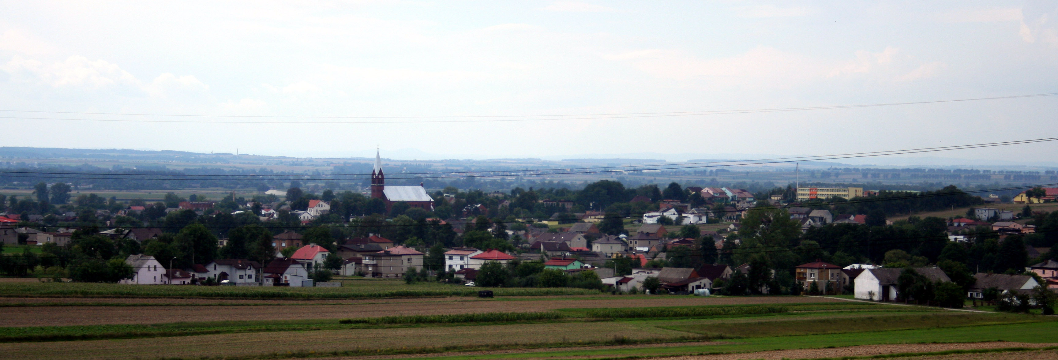 panorama_Lubomii, powiat wodzisławski, widok od strony północno-wschodniej